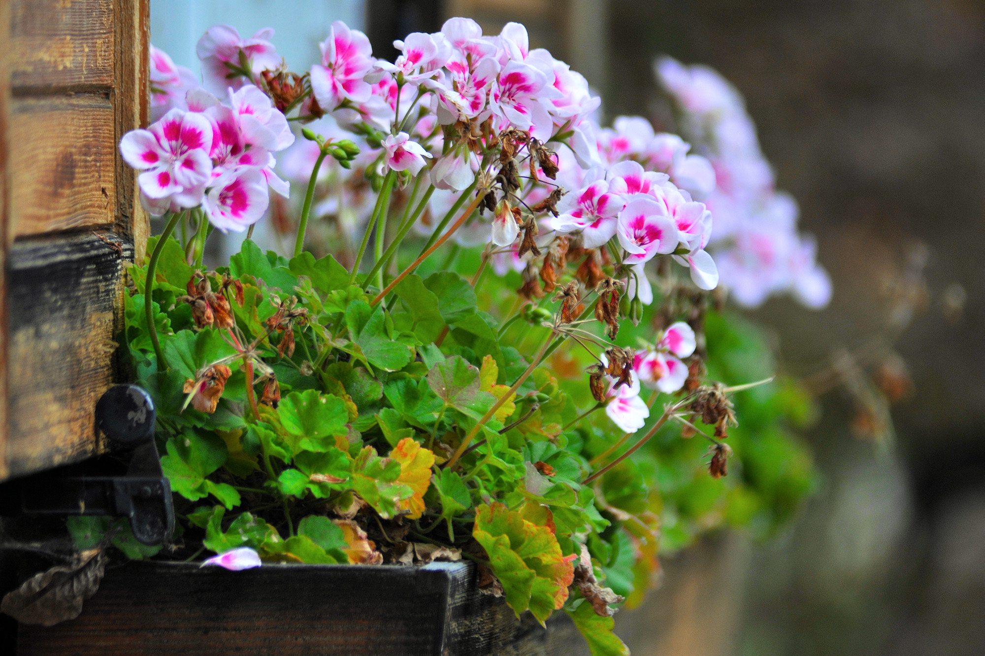 Pelargonium zonale